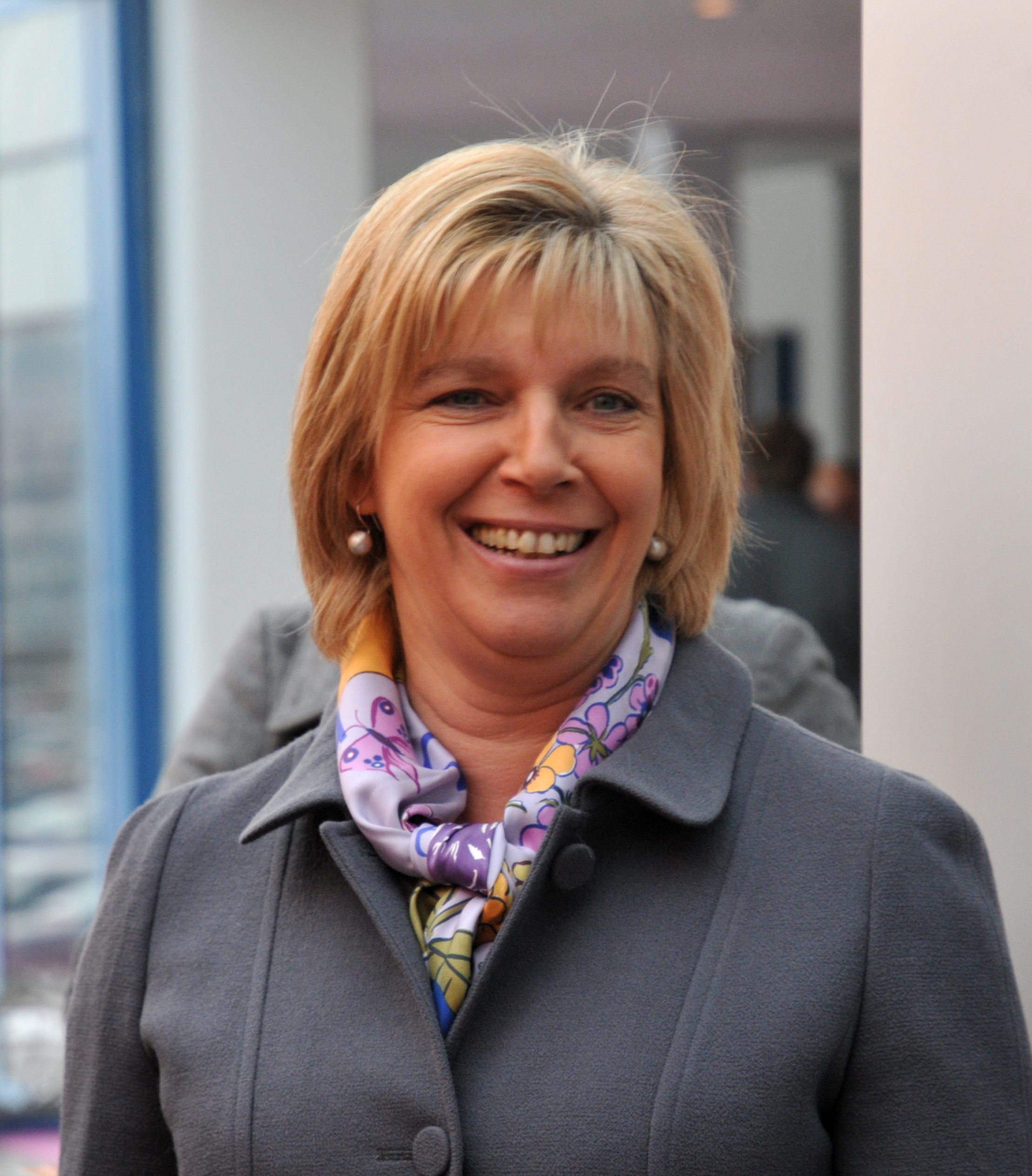 D'Ministesch fir Tourismus Françoise Hetto op der Foire Vakanz 2013.